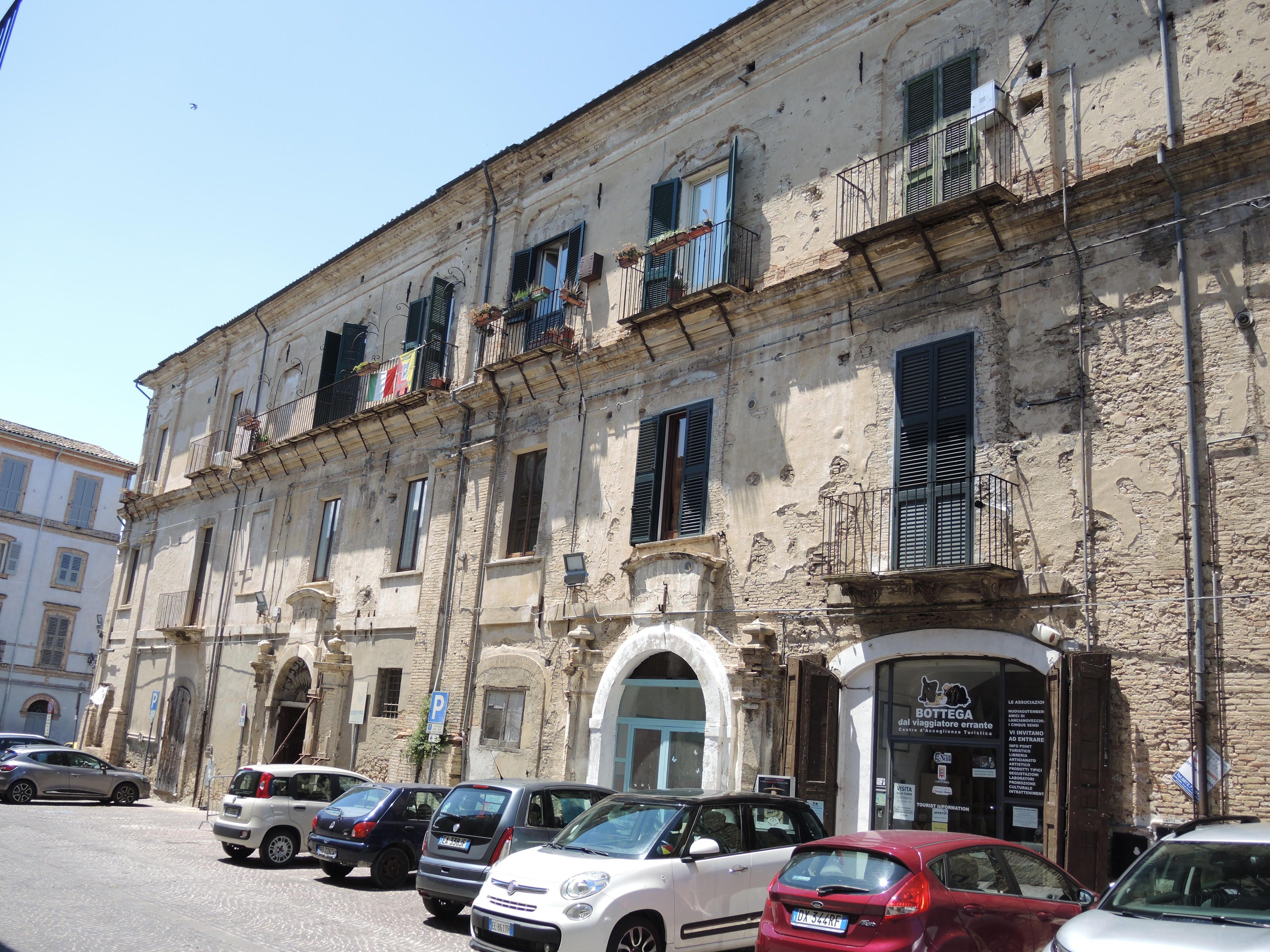 Lanciano